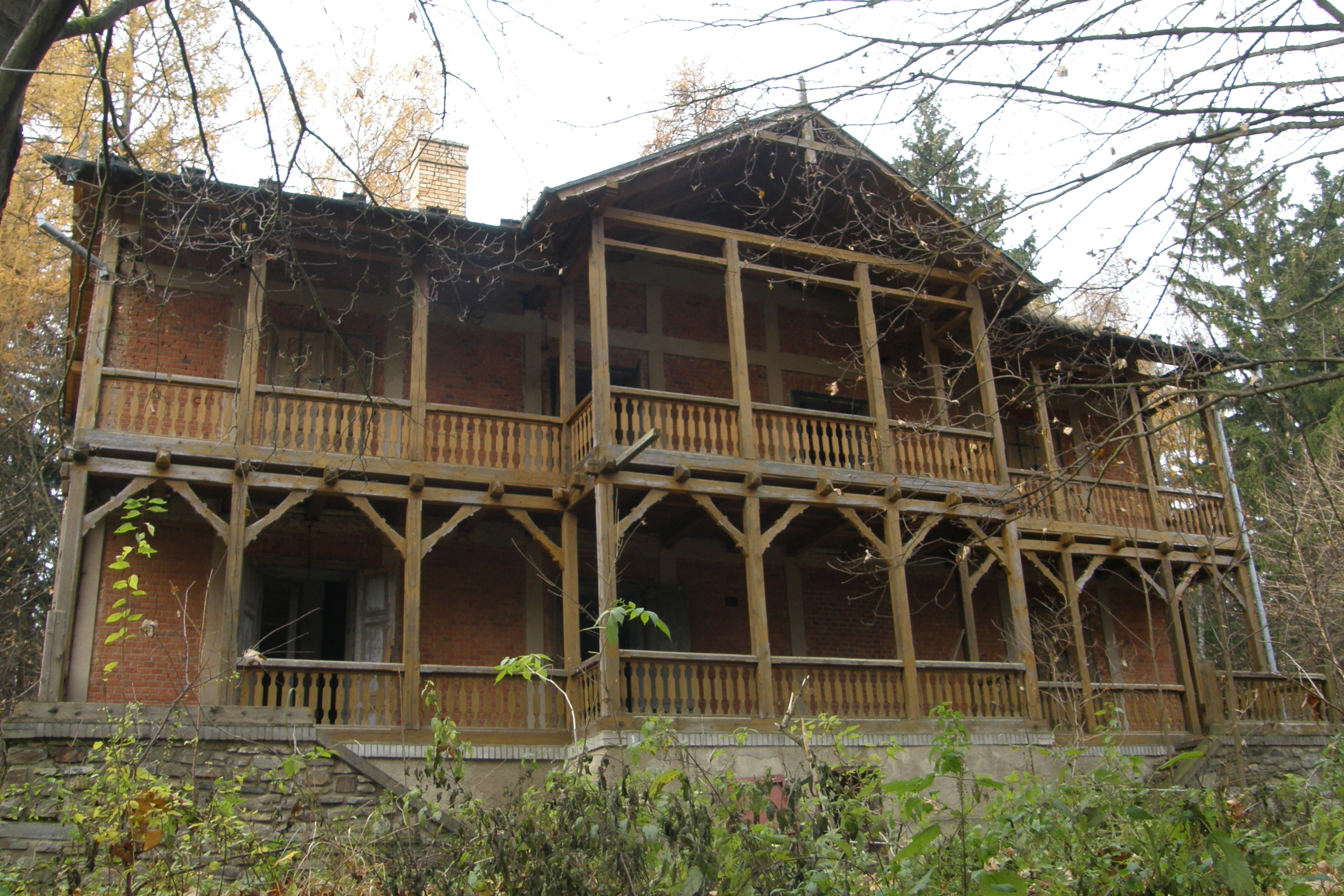 Zámek Rakovec u Jedovnic